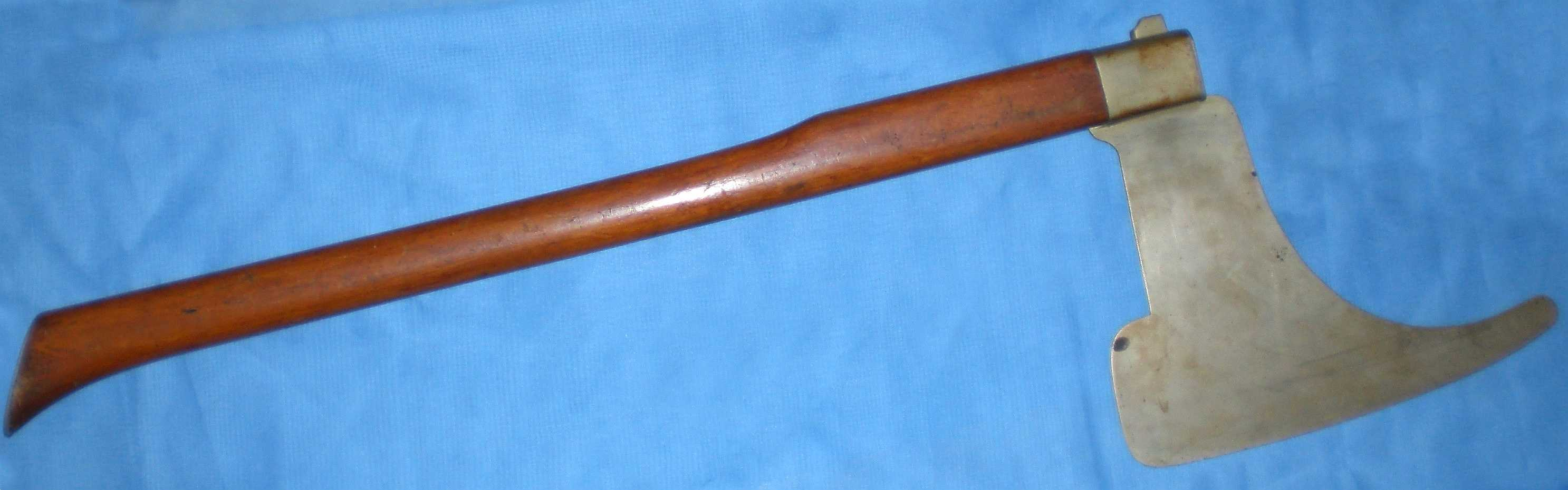 Parade-Bergbarte, ca. 1920